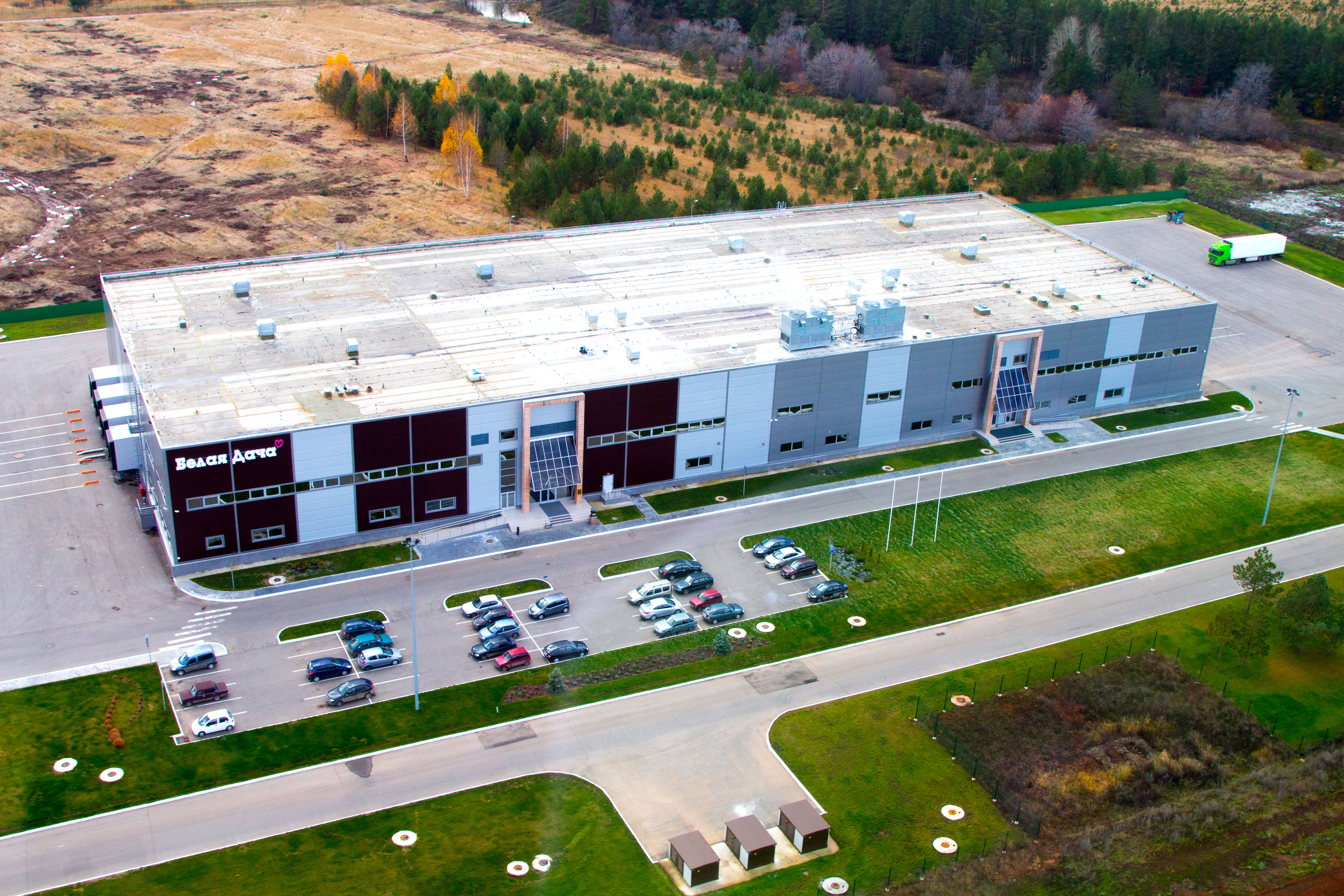 Особая экономическая зона «Алабуга», Завод «Белая Дача Алабуга»